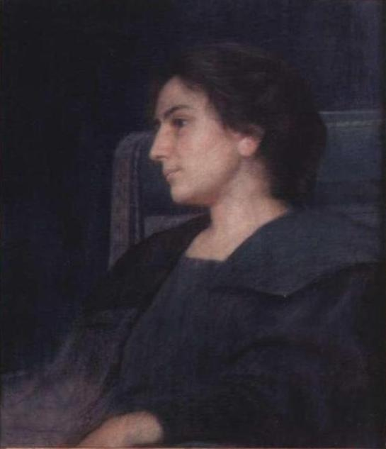 Octavian Smigelschi - Portretul soţiei, Muzeul Naţional de Artă din Cluj